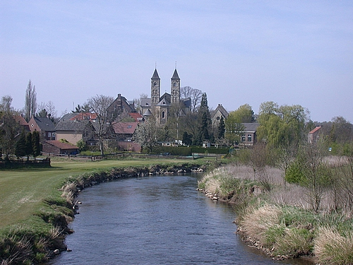 Zelf gemaakt, GNUSt.Odilienberg, de Roer en de basiliek